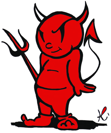 Dimoni de la revista Mil Dimonis